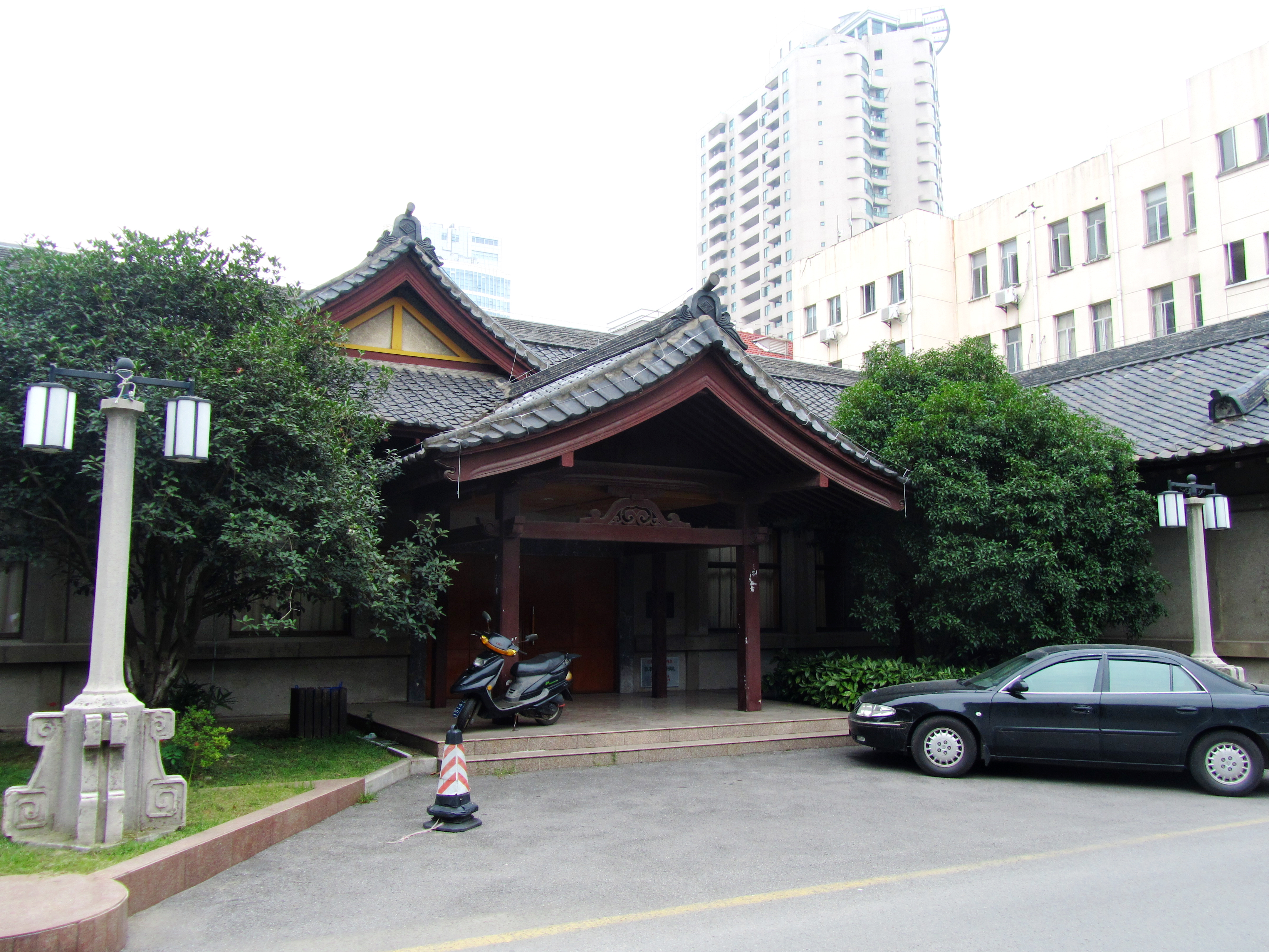 南京神社旧址，侧殿，西面。